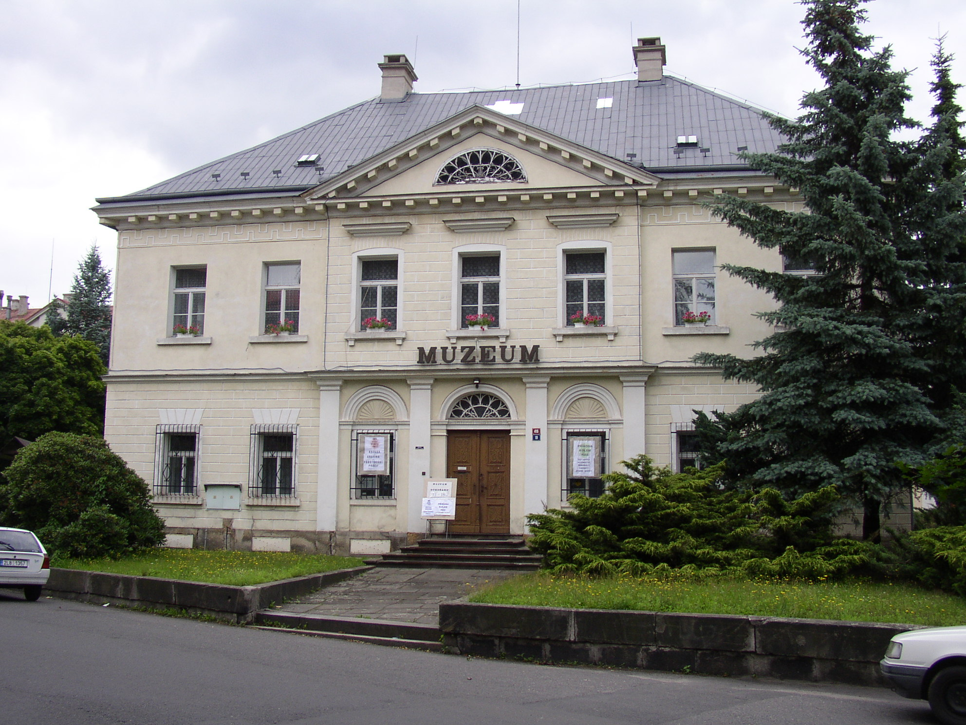 Budova muzea ve Varnsdorfu, Varnsdorf, okres Děčín, Česká republika